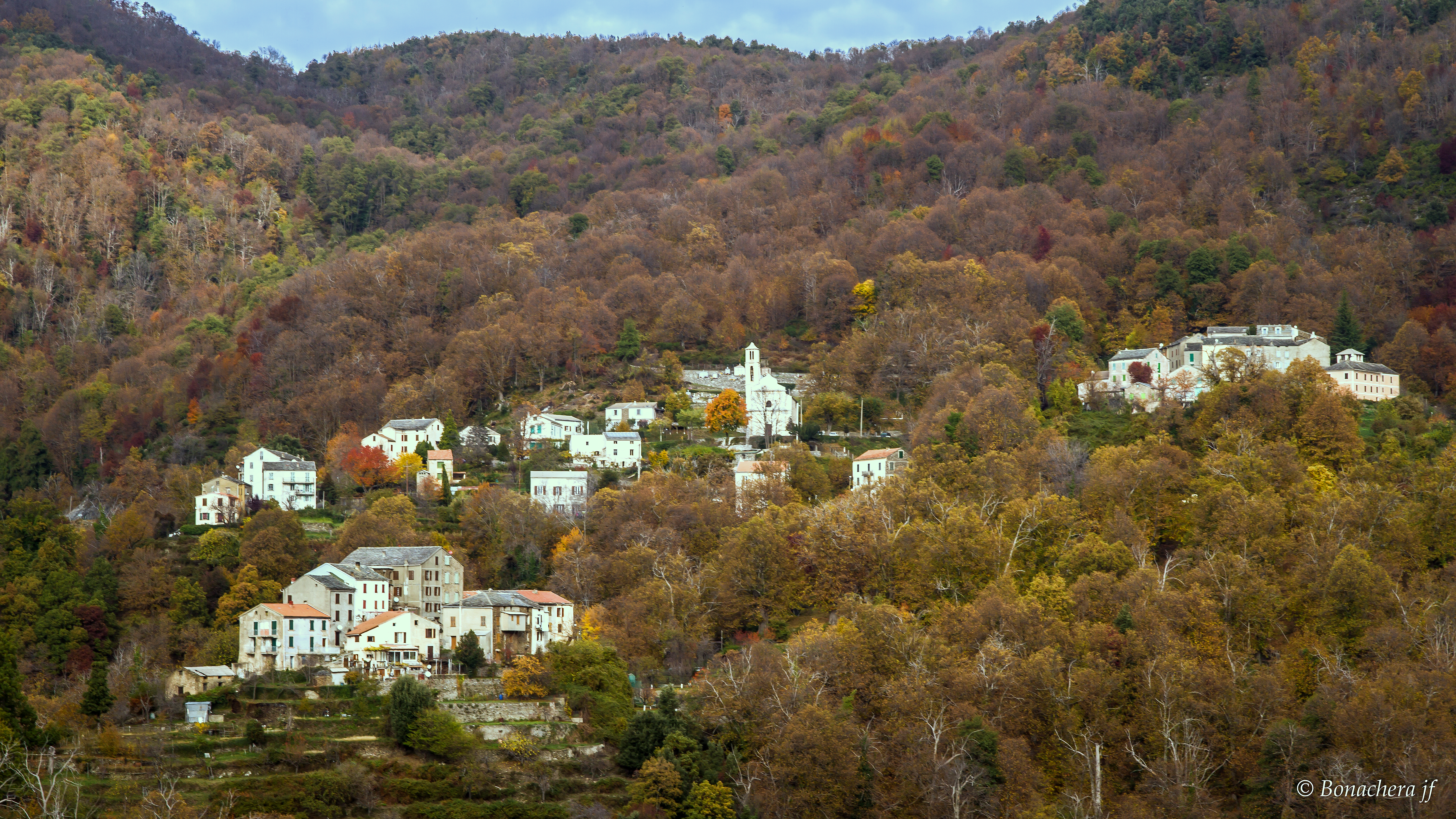 Felce et le hameau de Volgheracciu